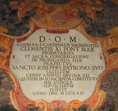 Dedicazione e memoria del Cardinale Giuseppe Sacripante nella Cappella S Giuseppe in Sant'Ignazio, Roma